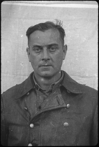 Hans Kurt Eisele (* 13. März 1913 in Donaueschingen; † 3. Mai 1967 in Kairo) war ein deutscher SS-Hauptsturmführer und deutscher KZ-Arzt in Konzentrationslagern.